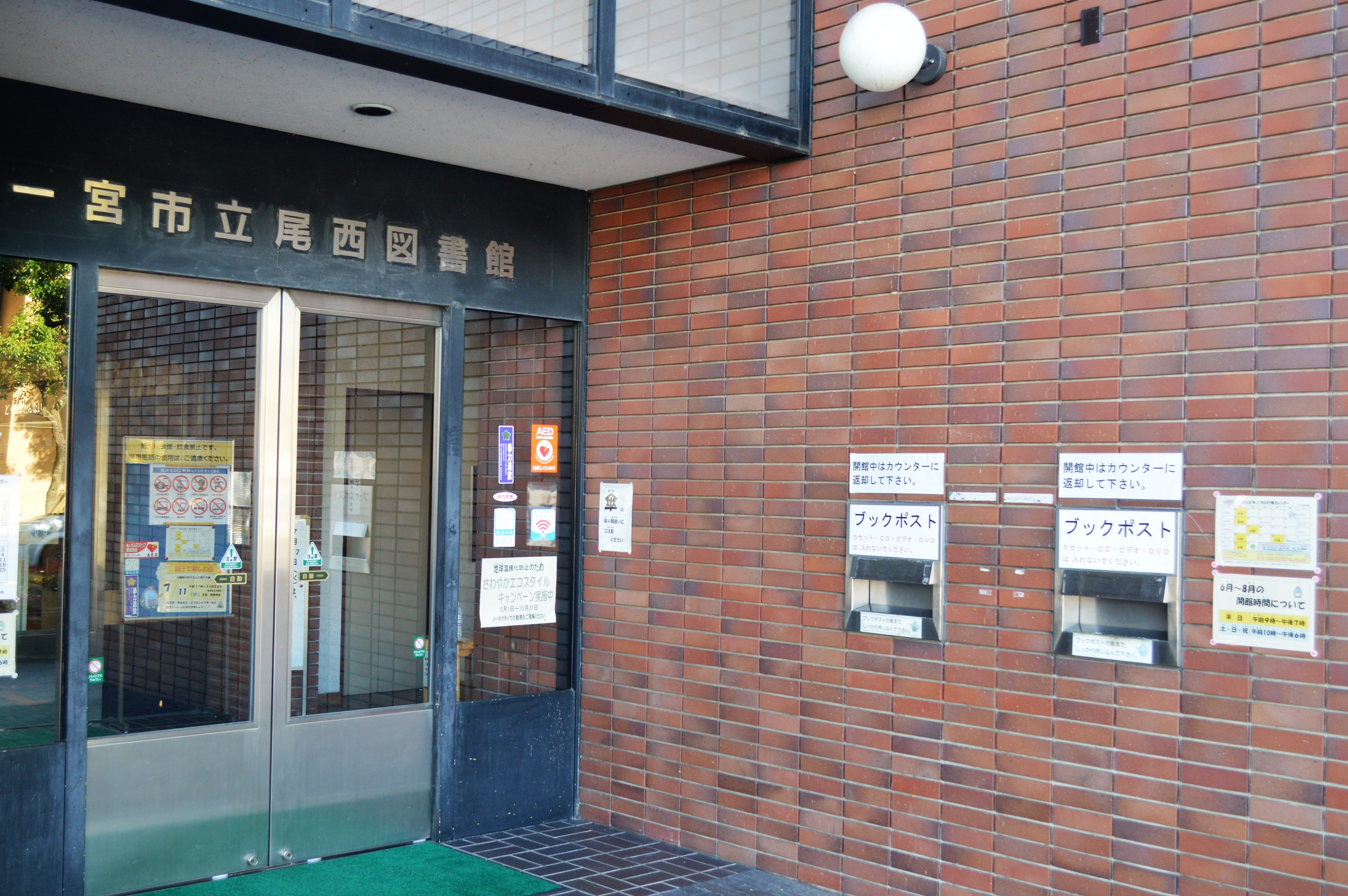 愛知県一宮市にある一宮市立尾西図書館の入口。旧・尾西市立図書館。右側はブックポスト。